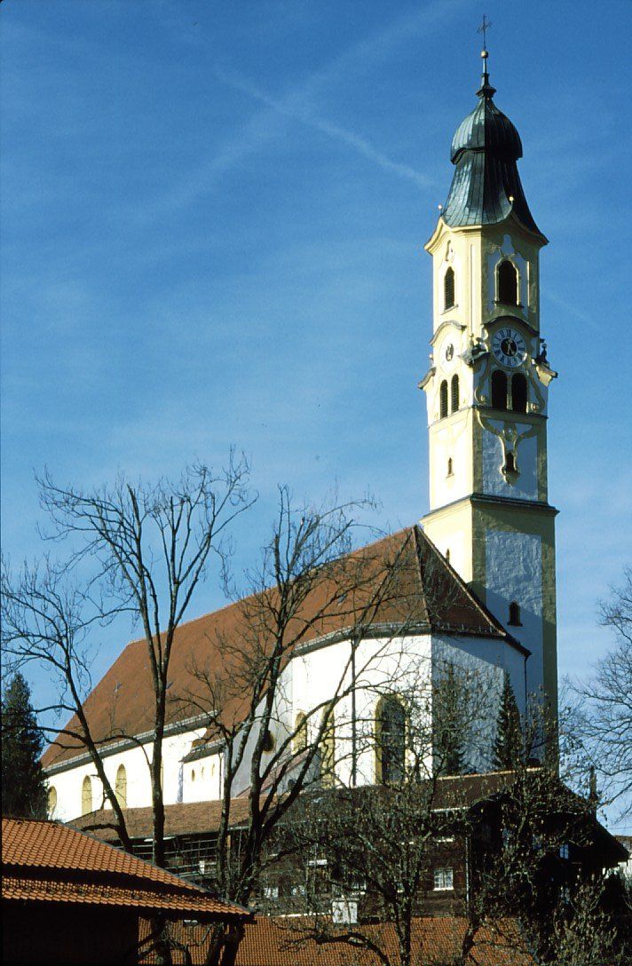 Außenansicht der Pfarrkirche St. Nikolaus in Pfronten